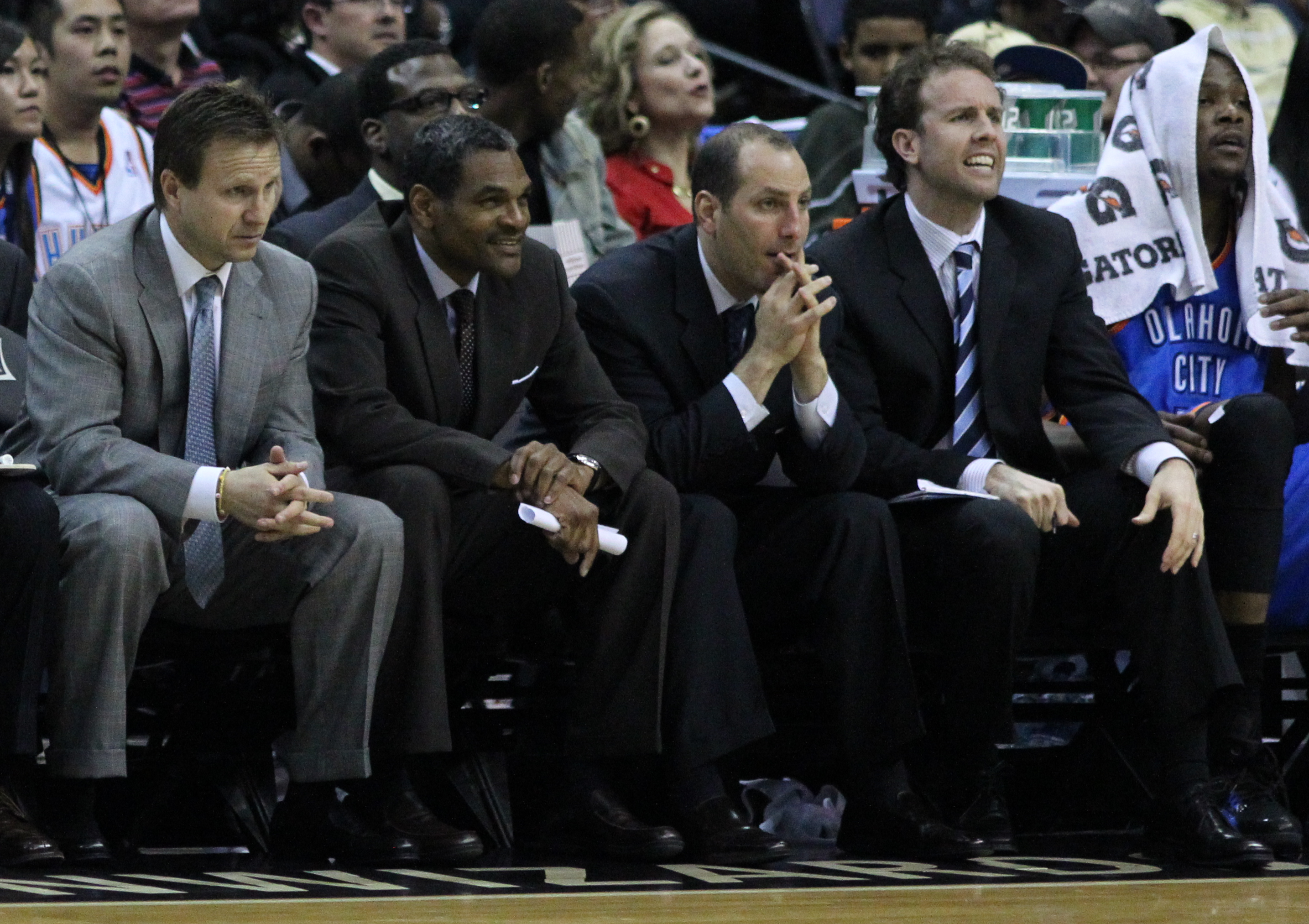 Wizards v/s Thunder 03/14/11